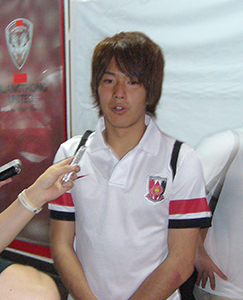 Shinya Yajima